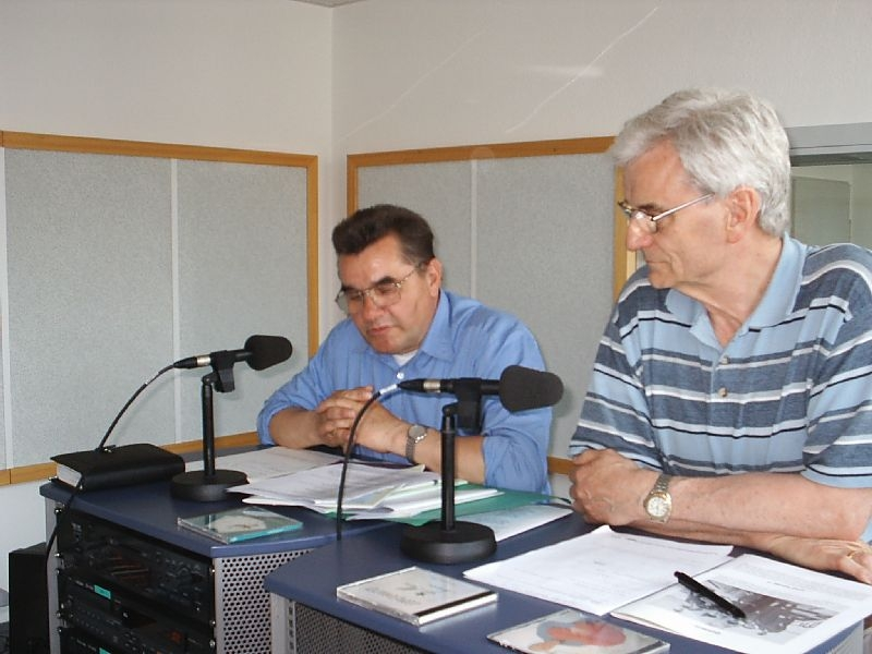 Werner Pfennig kaj Werner Lewien en la studio de "NB-Radiotreff 88,0" la 4an de majo 2006